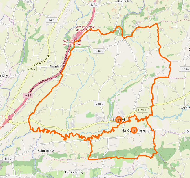 Carte de la commune nouvelle en 2019 de Tirepied-sur-Sée avec ses communes déléguées